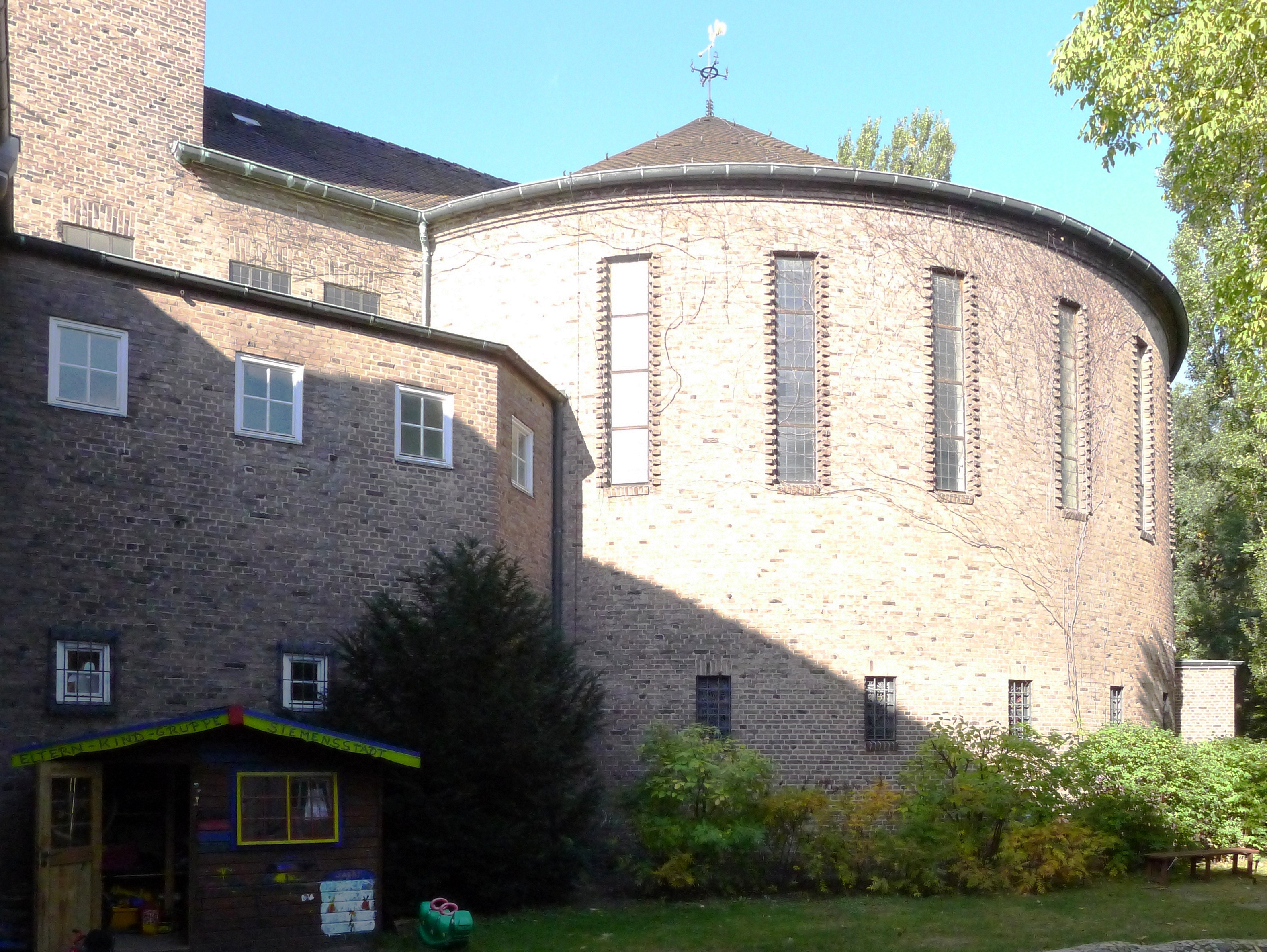 Rotunde